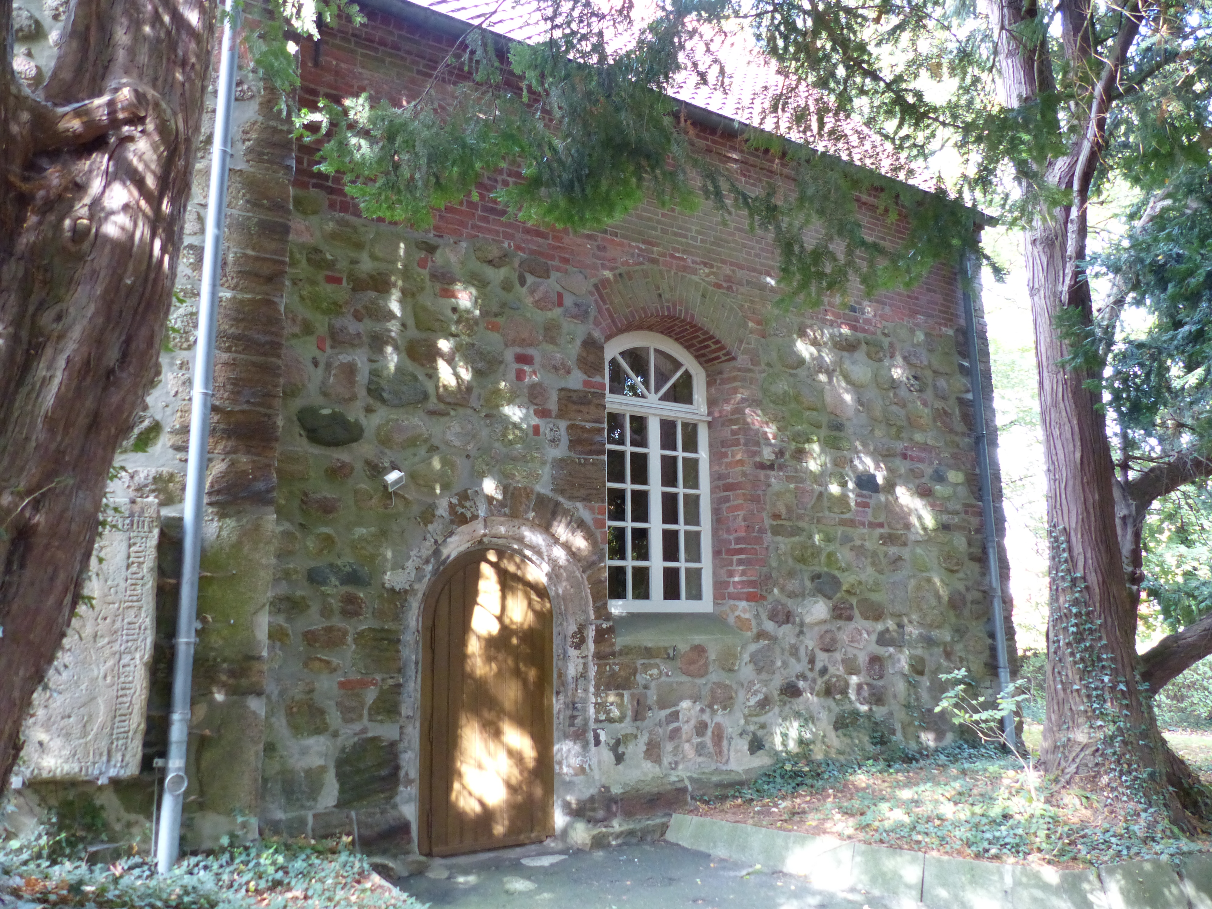 Chor der Wulsdorfer Kirche in Bremerhaven von Süden